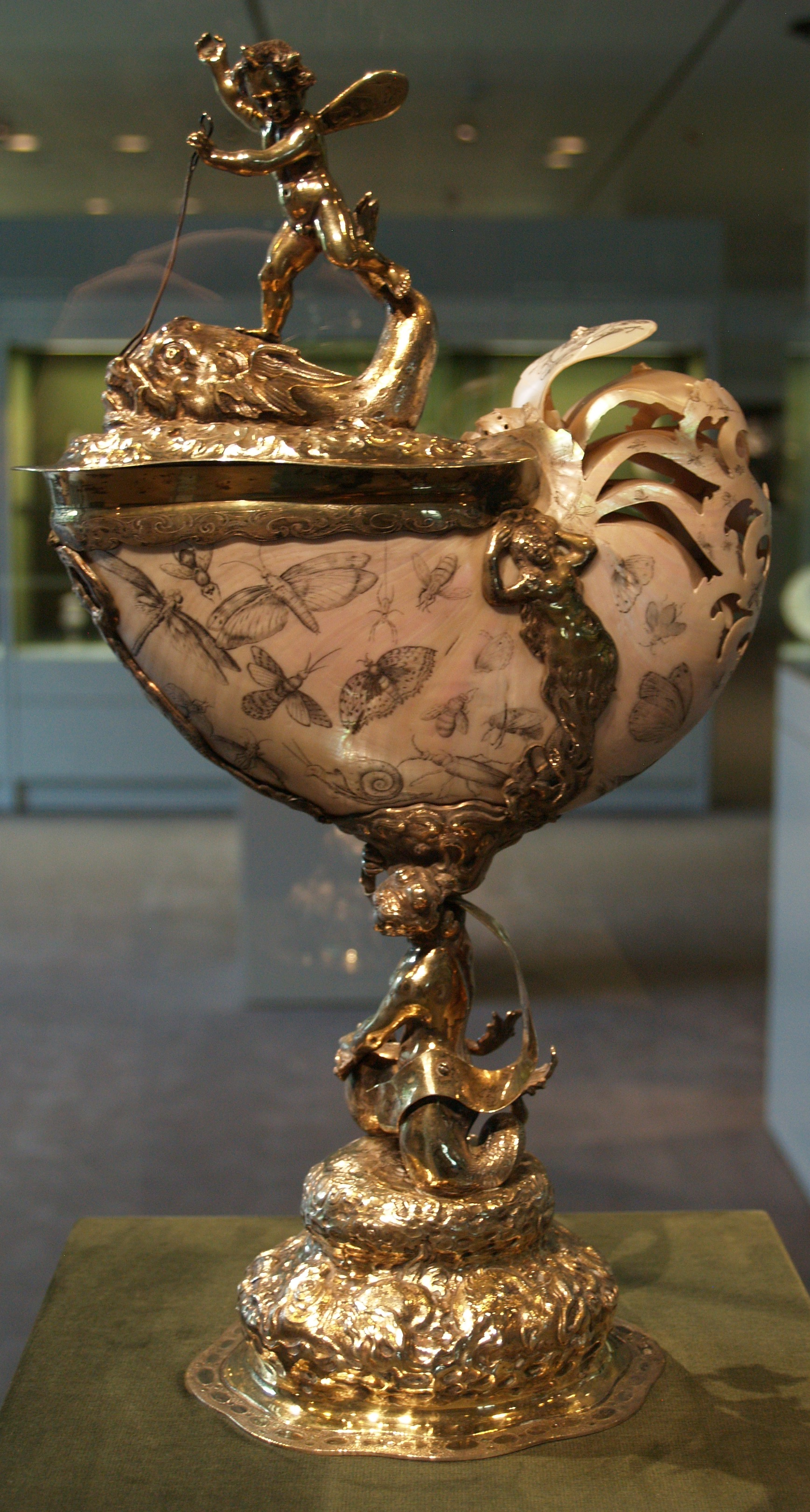 Berlín, Kunstgewerbe Museum, copa con nautilus s. XVII.